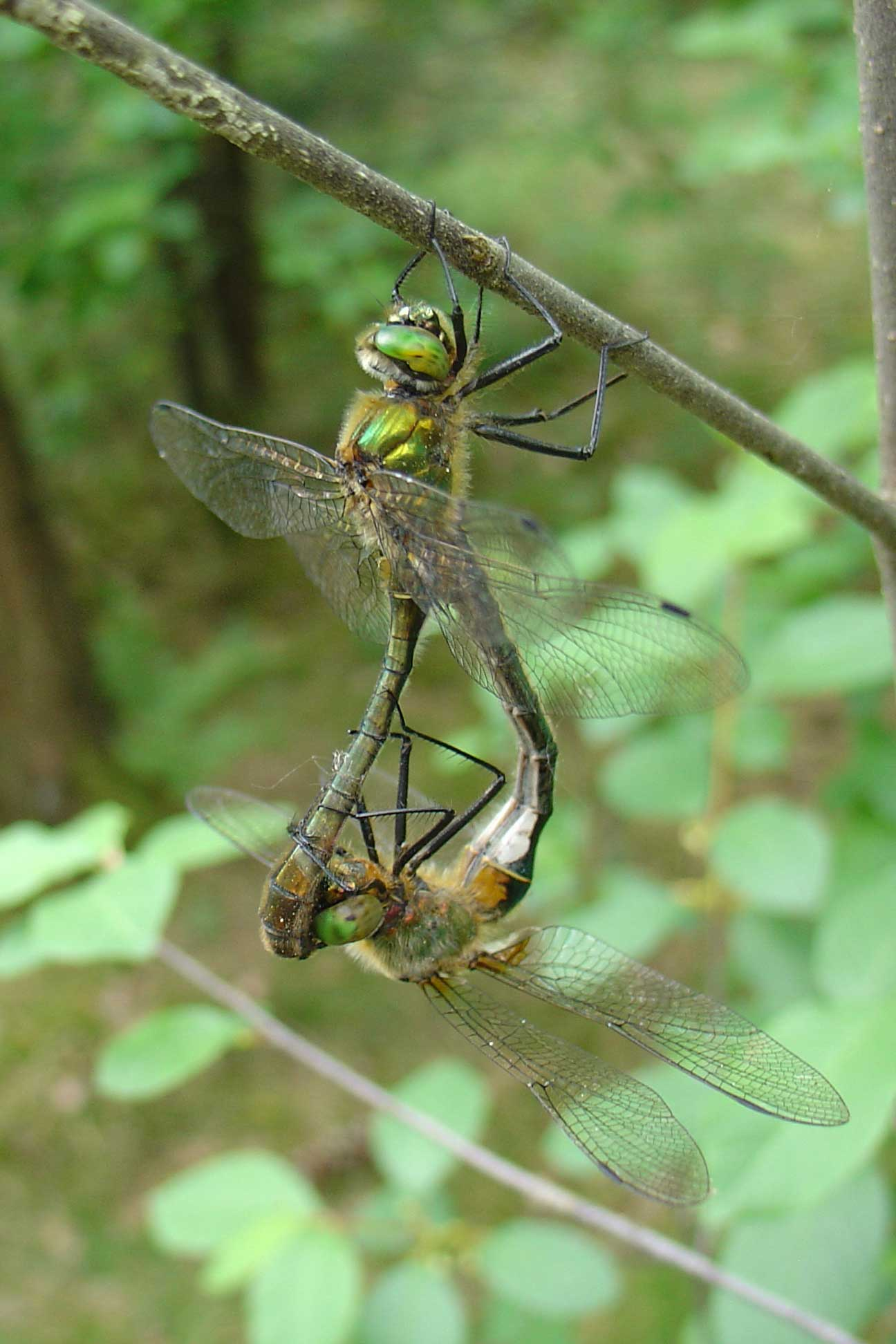 twee parende smaragdlibellen (Cordulia aenea) uit de familie van de glanslibellen (Corduliidae))